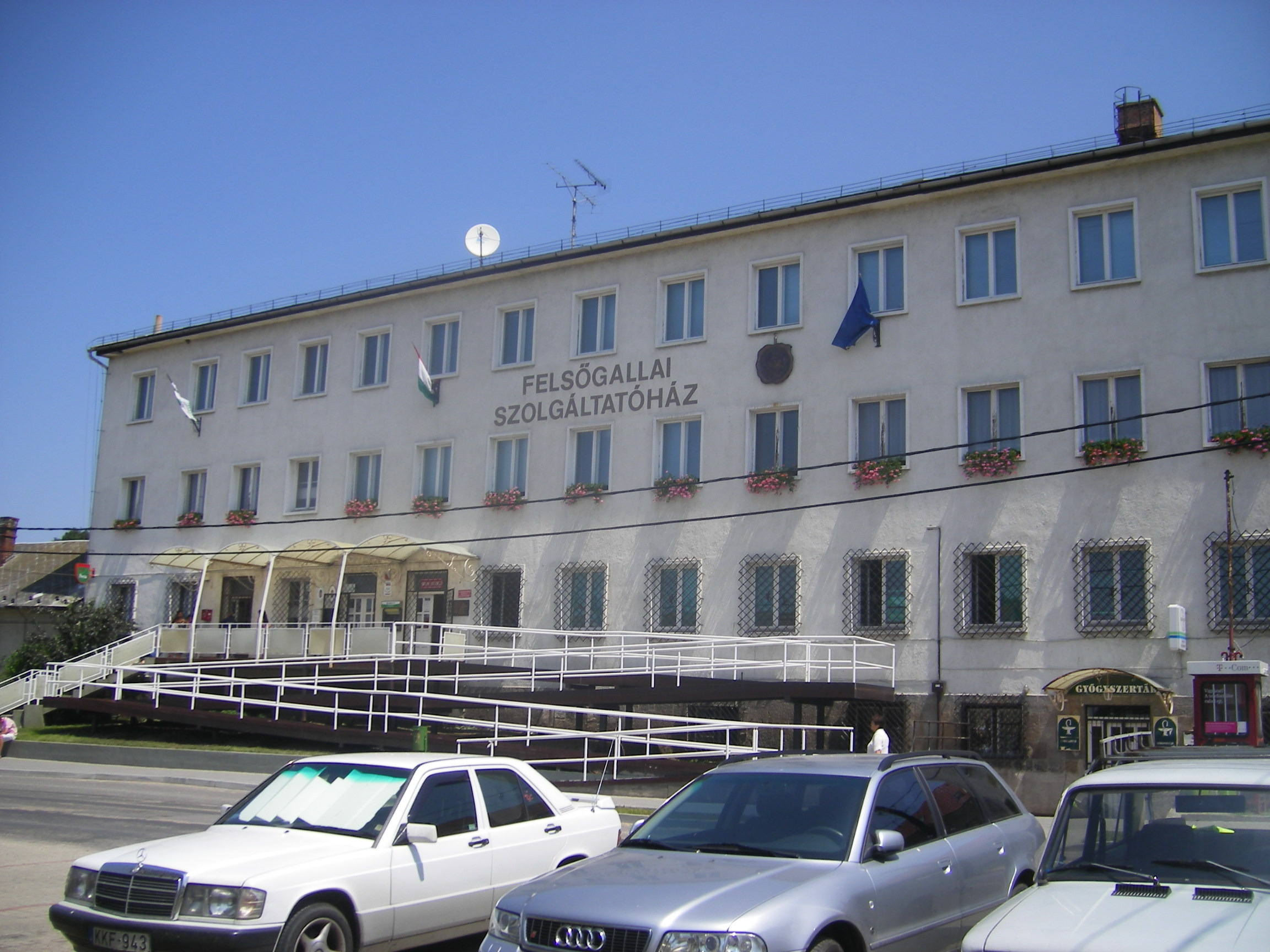 Felsőgalla - Szolgáltatások háza